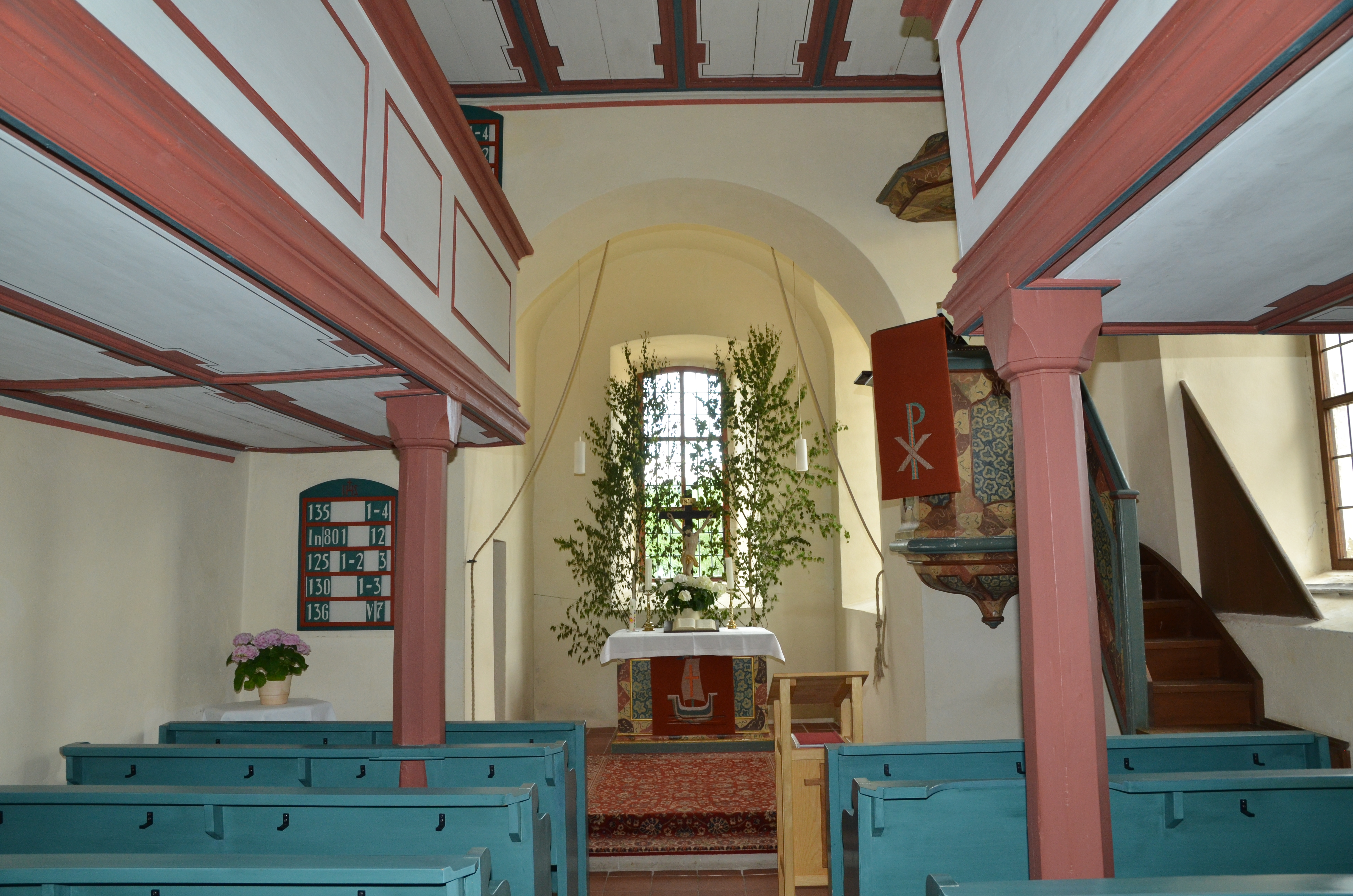 evang.-luth. Kirche St. Kilian und Kunigunde in Berglein